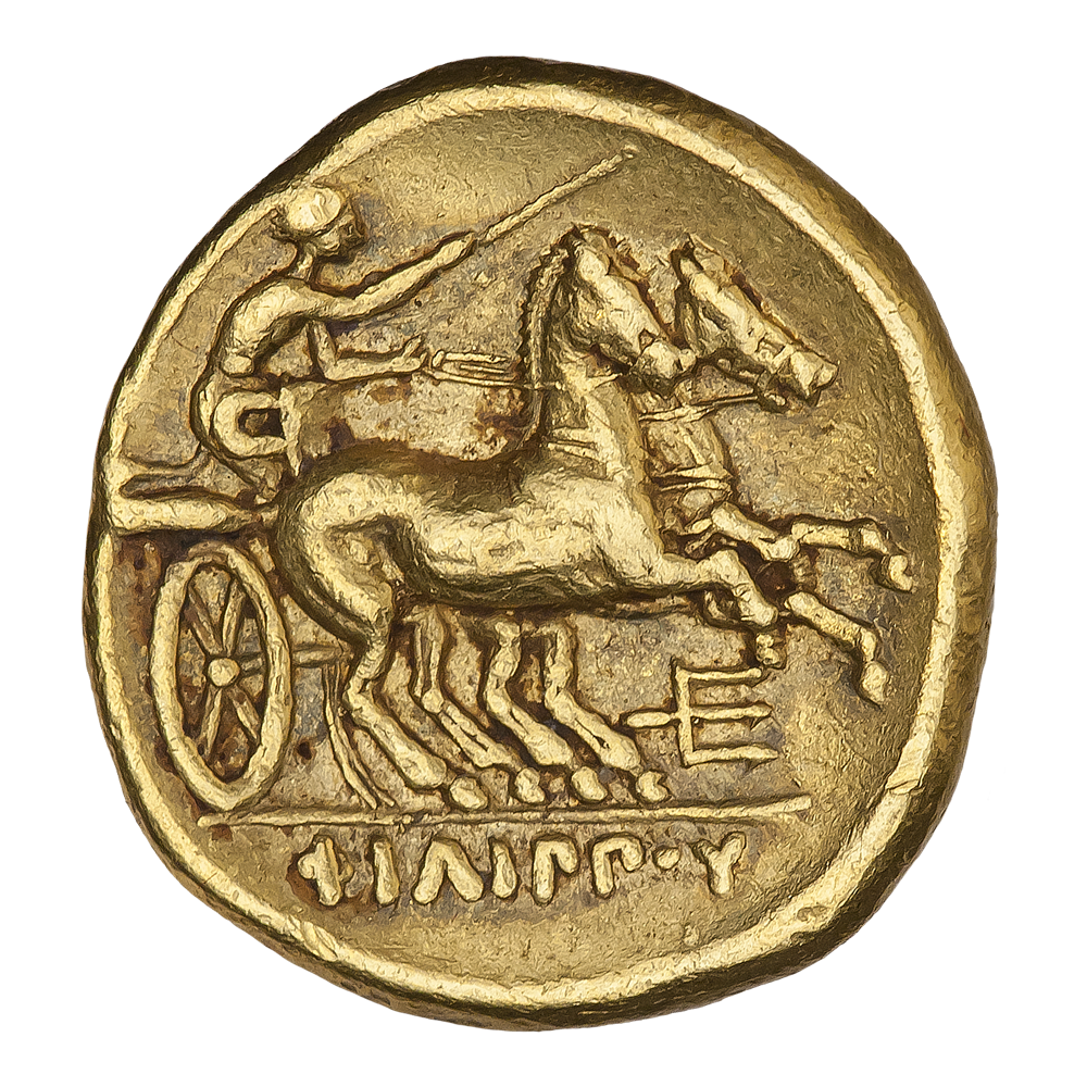 Македонское царство. Пелла (?). Филипп II (359—336 гг. до н.э.). Статер. Ок. 340—328 гг. до н.э. Реверс. Бига с возничим, вправо; под передними ногами коней трезубец. В обрезе надпись ΦΙΛΙΠΠOΥ.